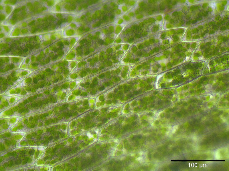 Rosenmoos (Rhodobryum roseum), Laminazellen, Vergrößerung: 250x